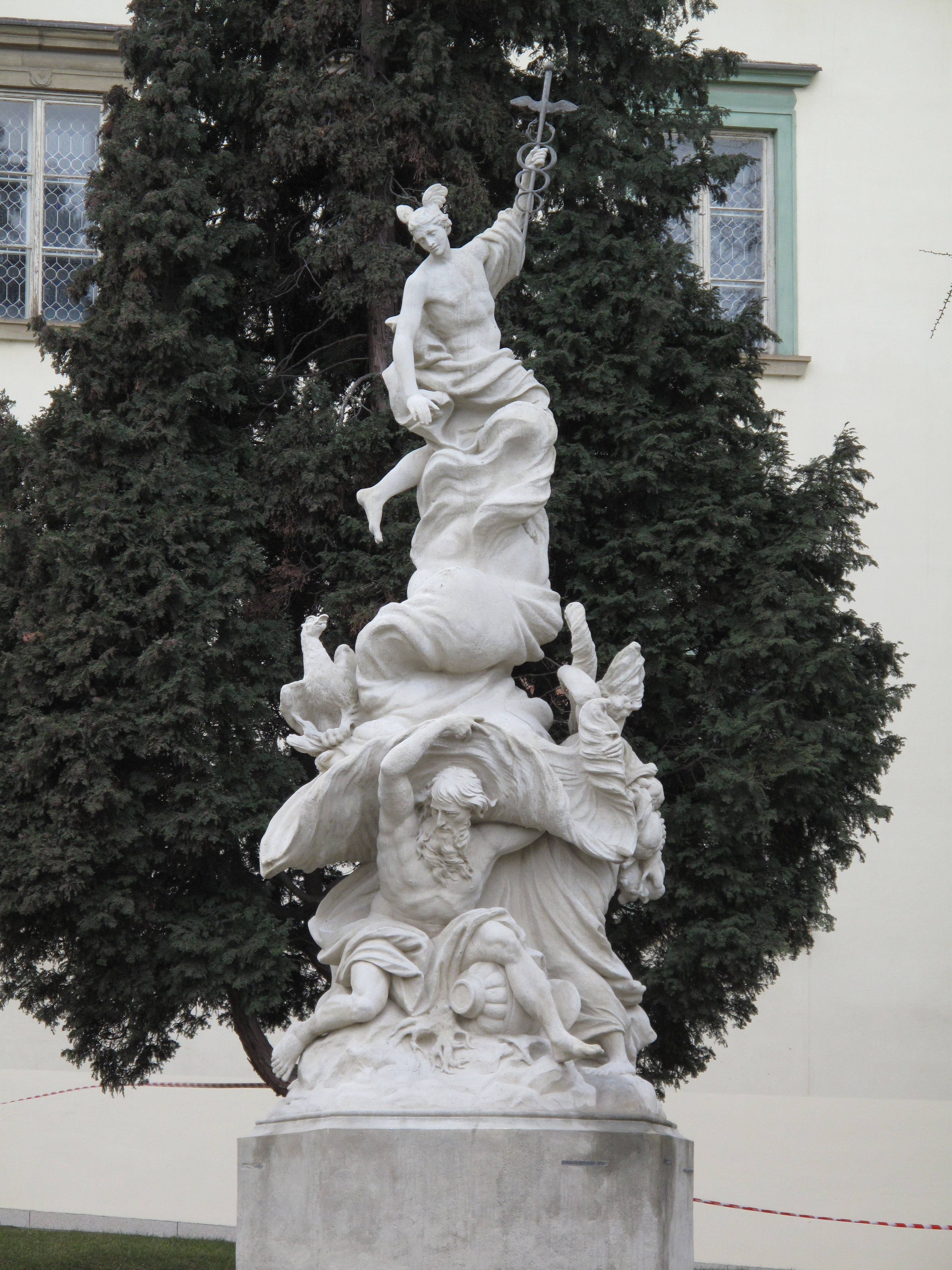 Biskupský dvůr, socha